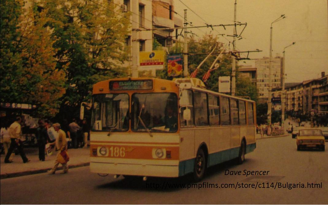 тролейбус ЗиУ